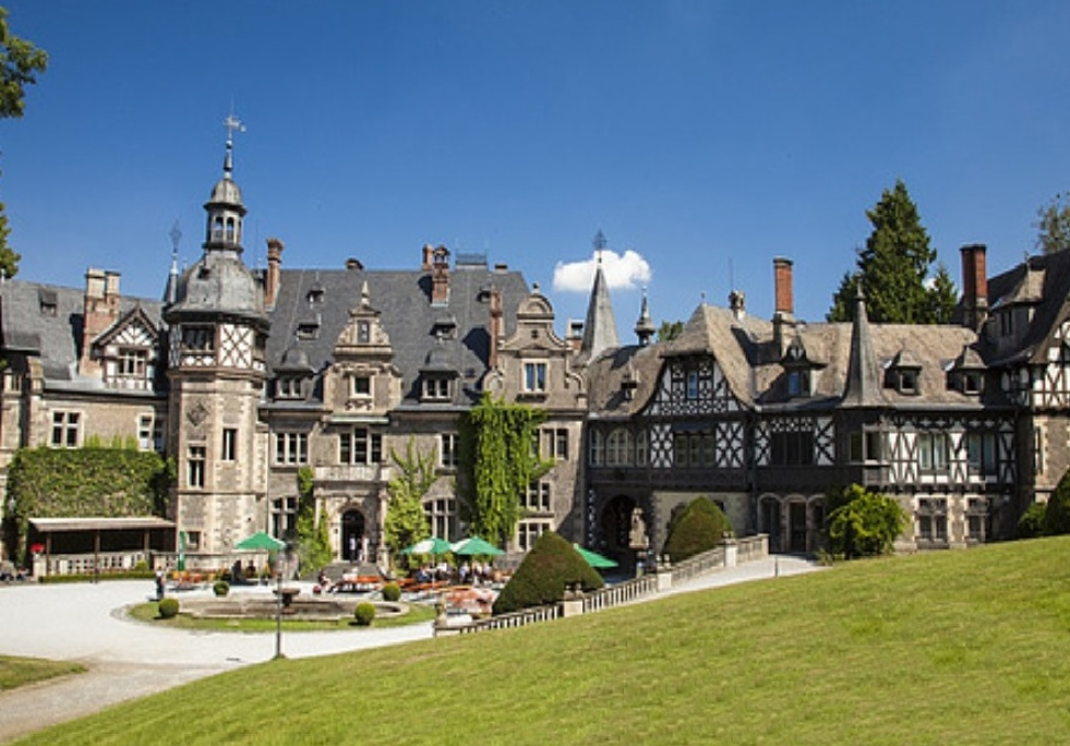 ギーセン大学付属ラウイッシュホルツハウゼン城